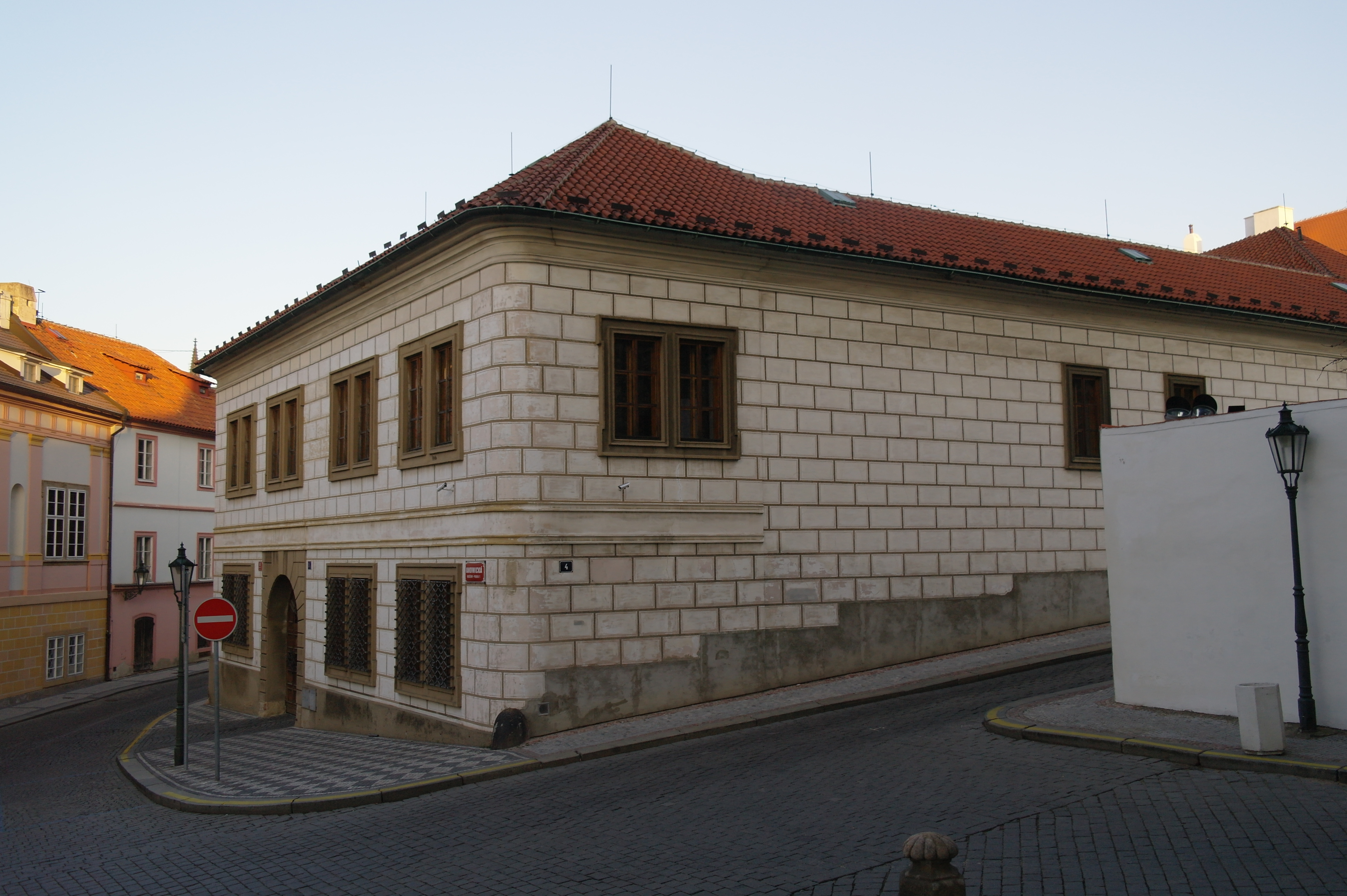 Dům pážat z Martinic